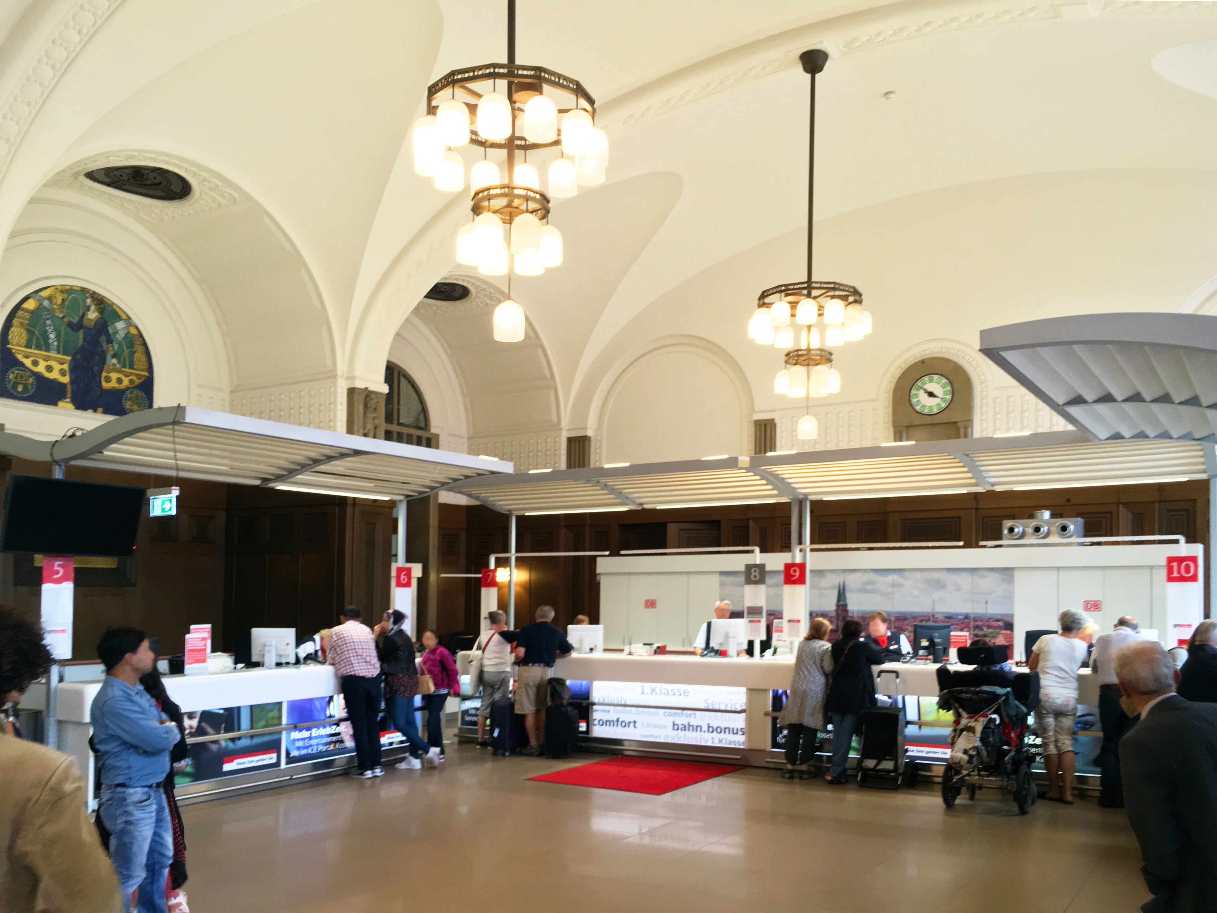 Jugendstilsaal mit DB-Reisezentrum im Nürnberger Hauptbahnhof